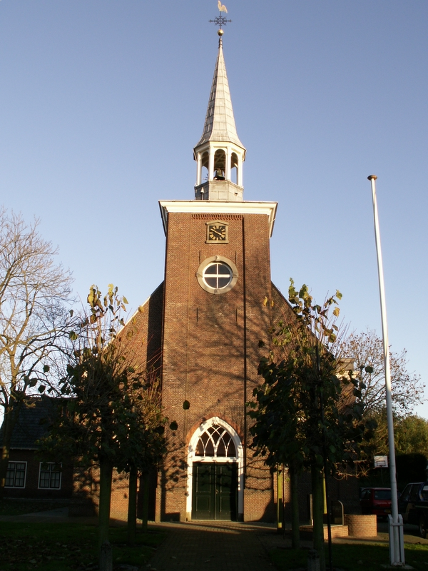 Church Leimuiden